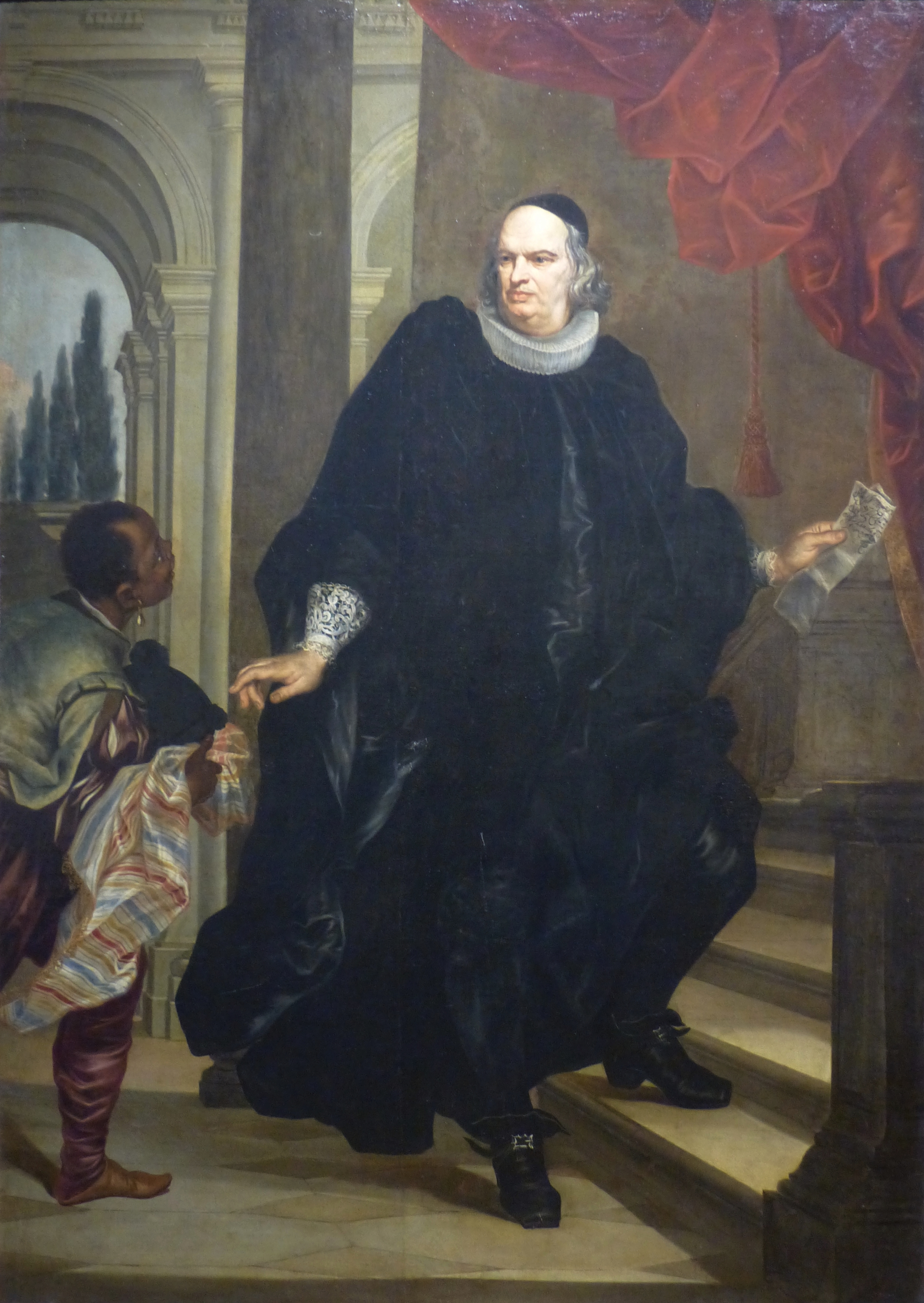 Paolo Gerolamo Franzone (1619-1702), sénateur de la République de Gênes en 1664, 1675, 1680 & 1687.